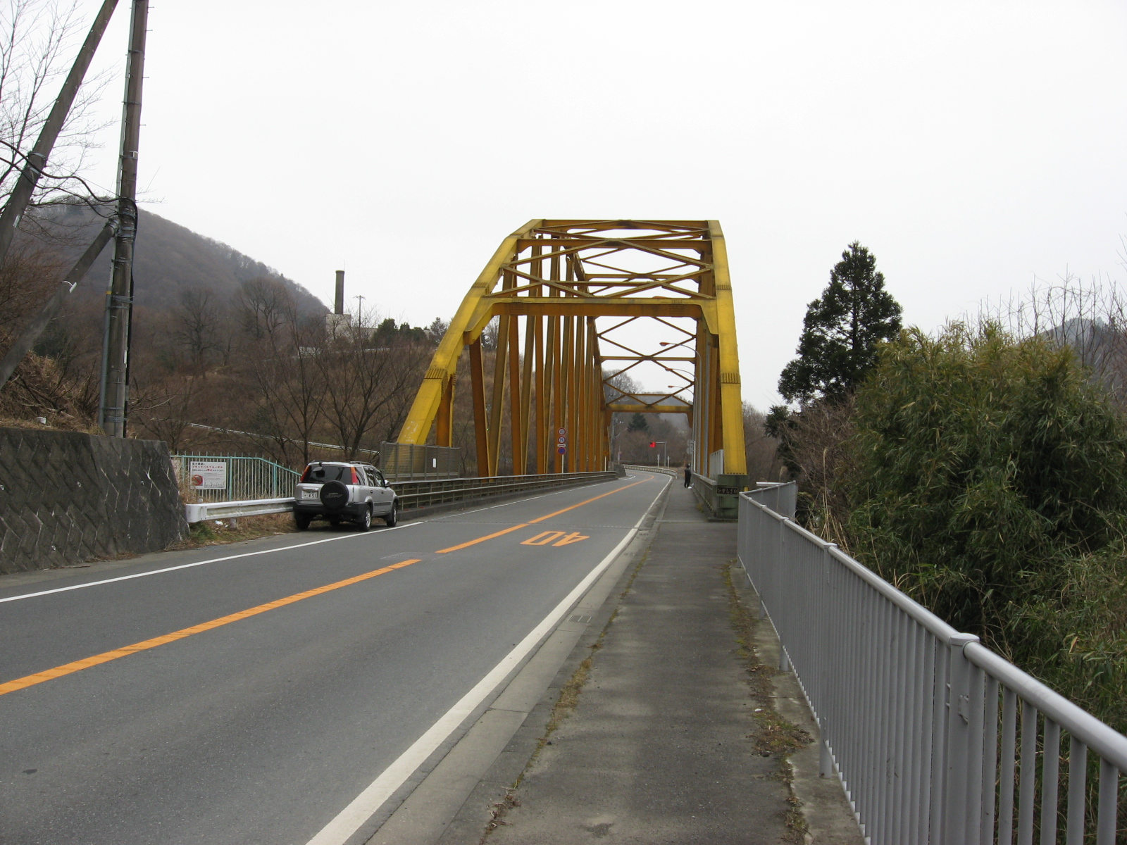 宮ヶ瀬湖に架かる東沢橋